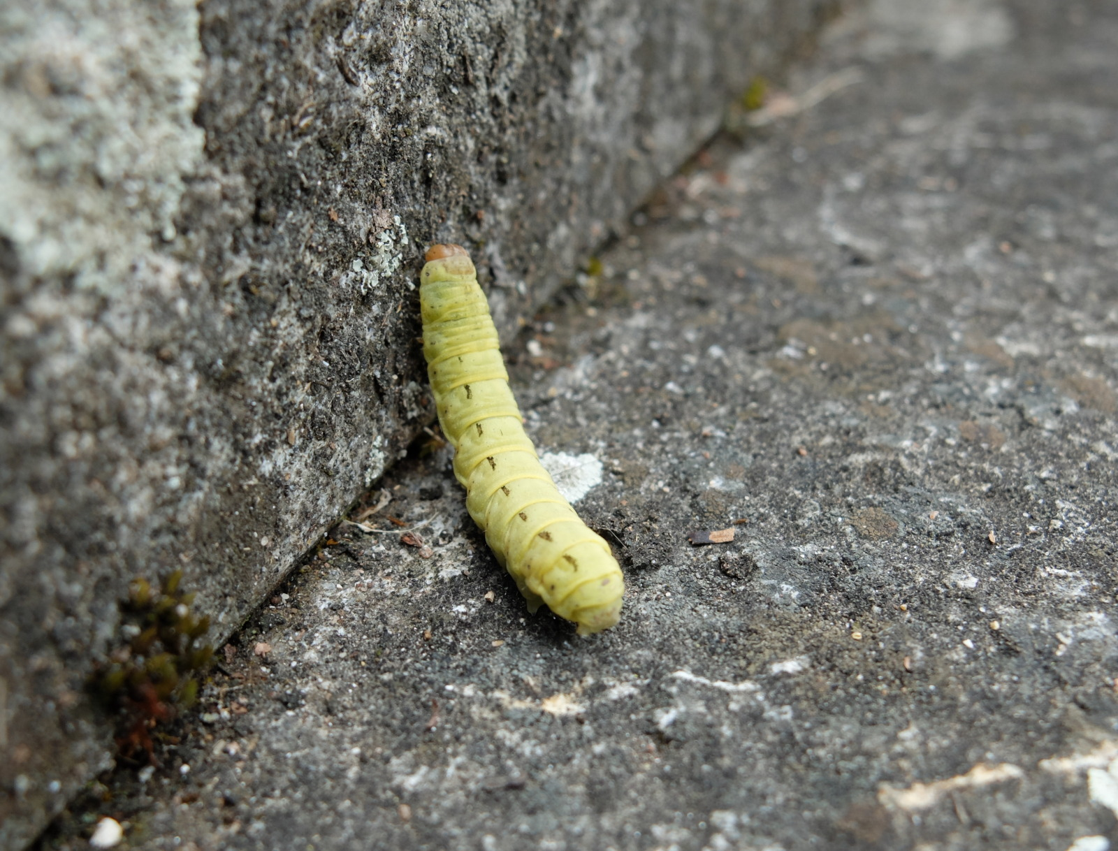 Noctua Pronuba auf einer Steintreppe